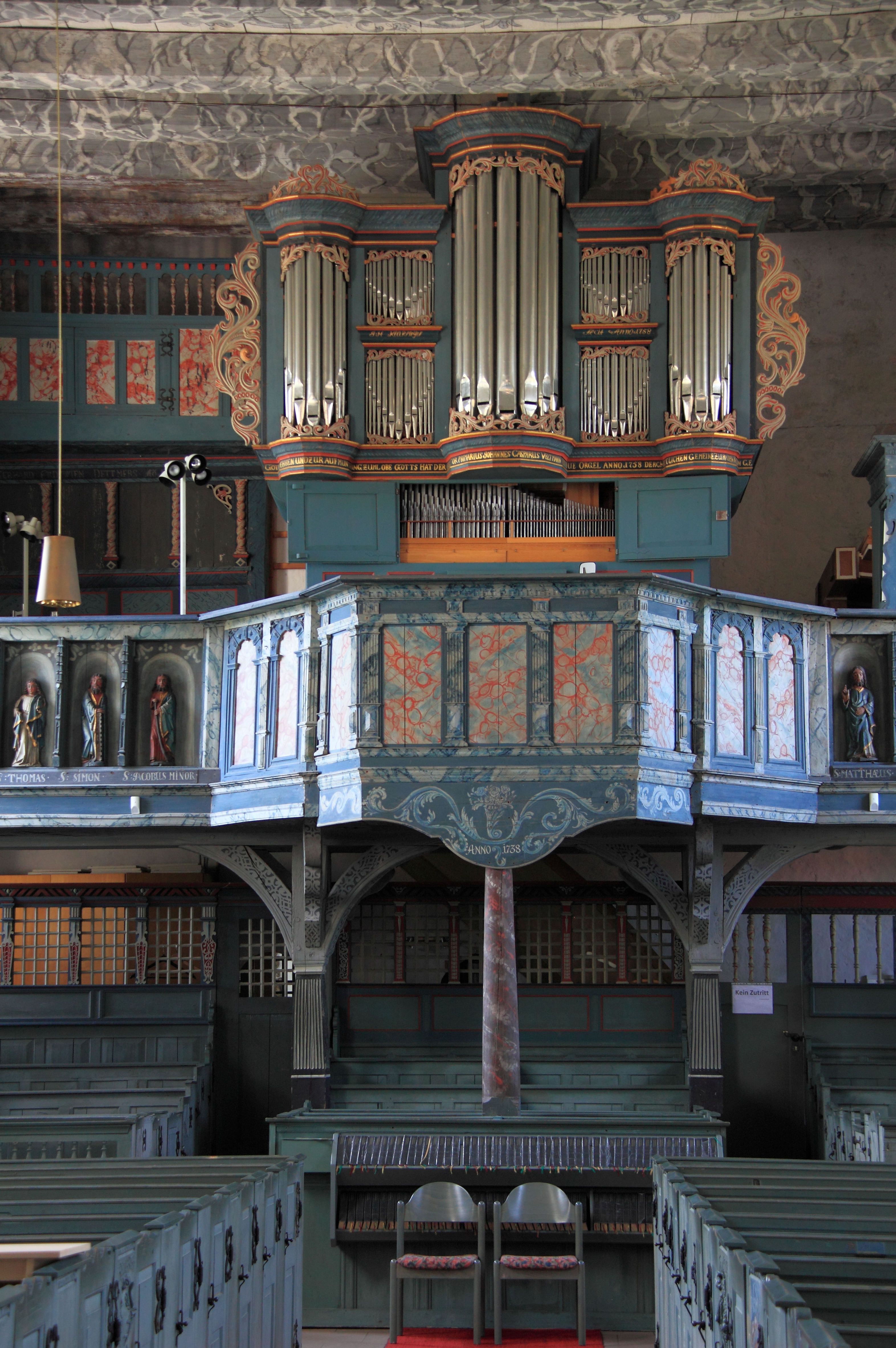 Orgel in Rodenkirchen